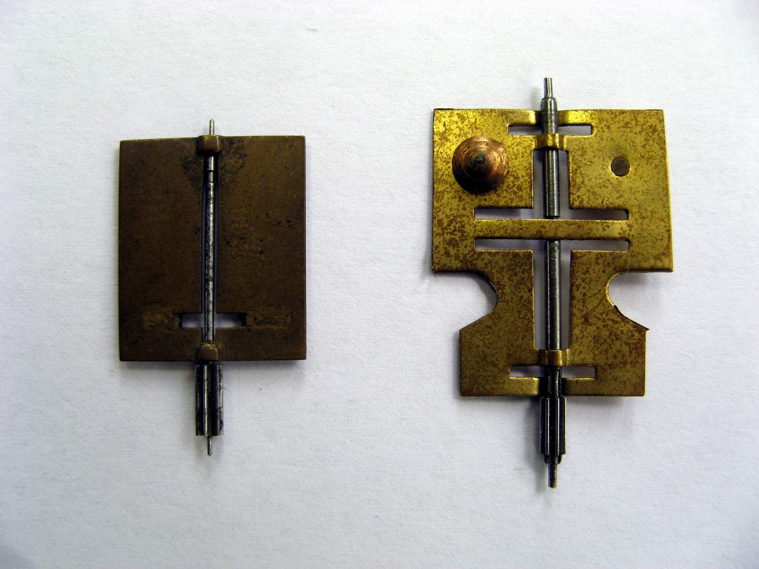 Windfang (einfacher Regler)